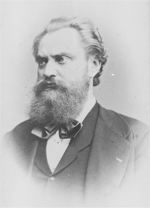 Albert Niemann (* 15. Januar 1831 in Erxleben Kr.Neuhaldensleben ; † 13. Januar 1917 in Berlin) war ein deutscher Tenor und Wagnerinterpret.